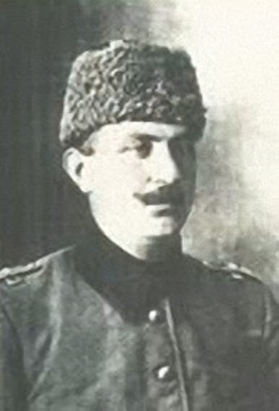 I.Dünya Savaşı'nda Osmanlı ordusunda Çanakkale'de Asteğmen, Irak'ta Yüzbaşı olarak görev almış şehit Türk subayı.